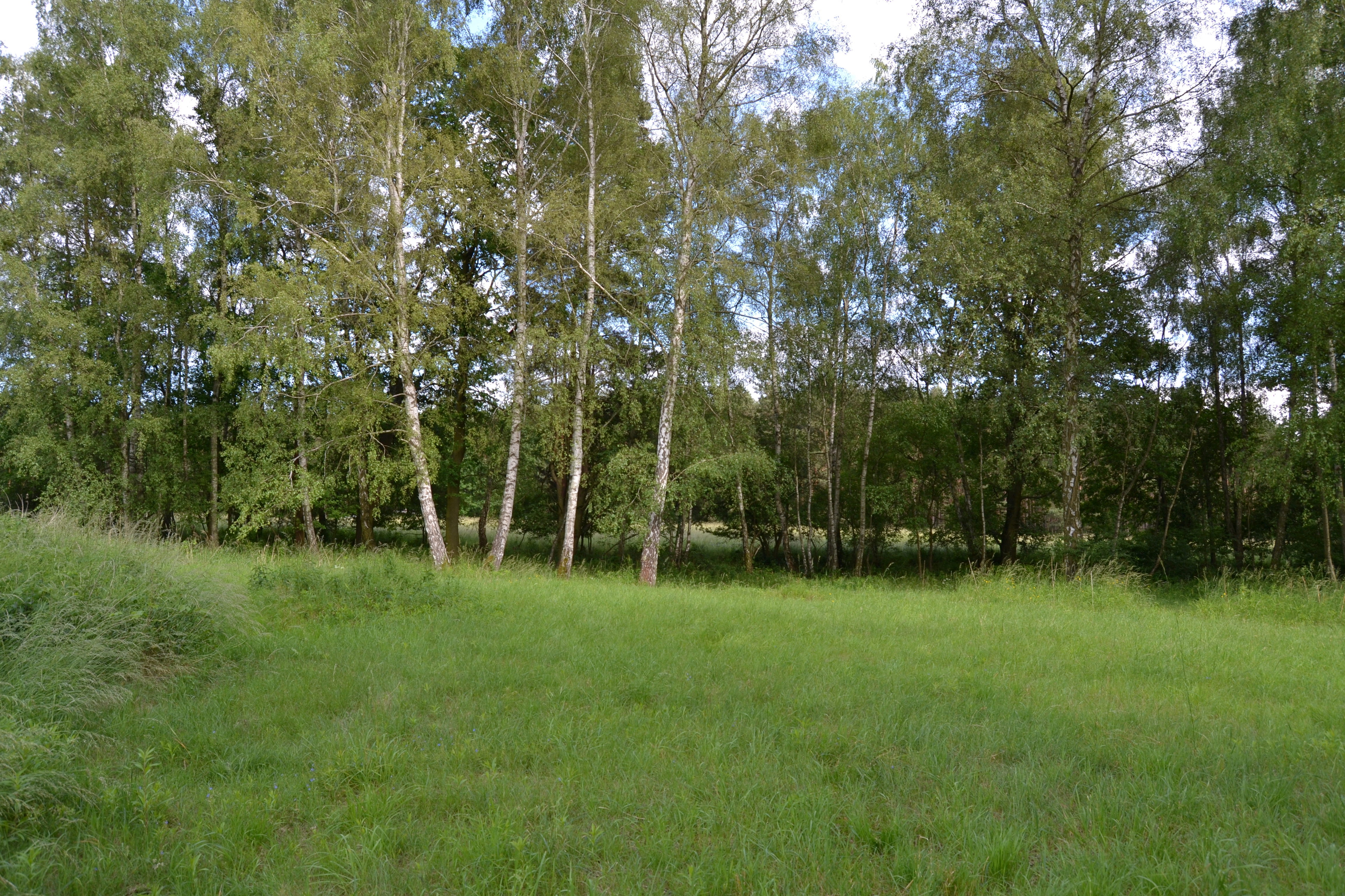 Naturdenkmal "Egelpfuhle am Stier" in Schöneiche bei Berlin im Mai 2014.